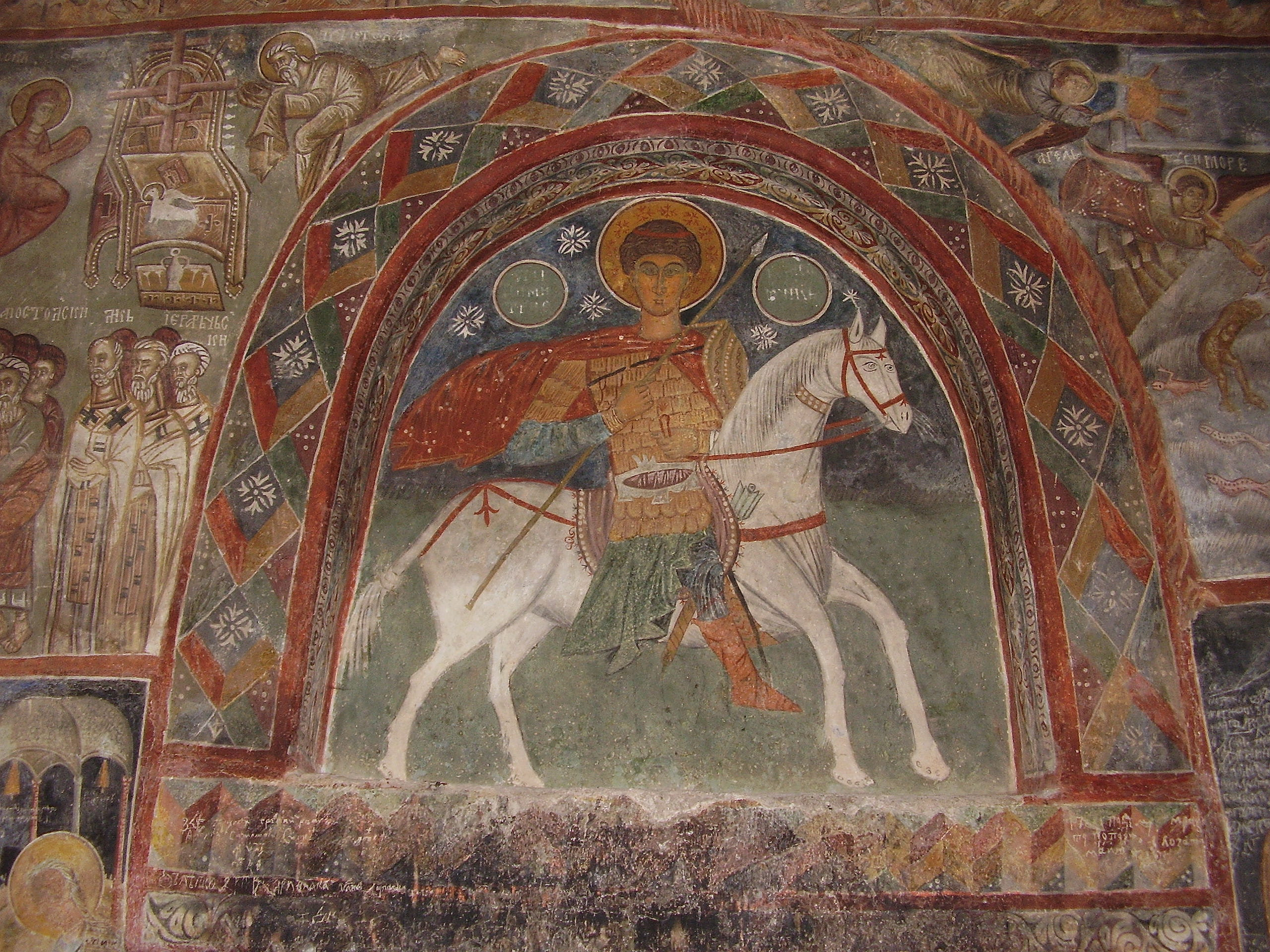 Свети Димитър - стенопис от църквата Свети Димитър - гр.Бобошево